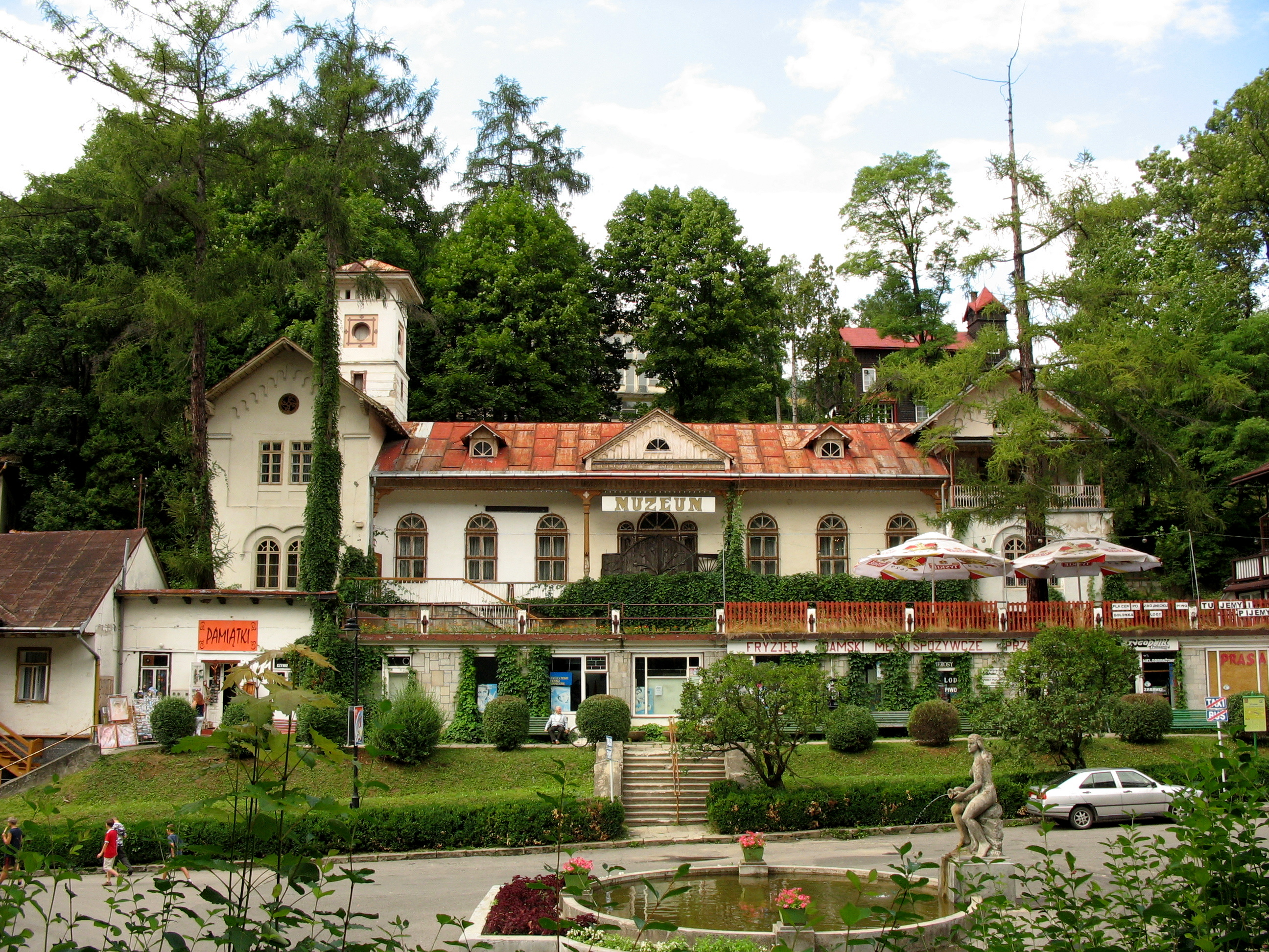 Szczawnica, pl. Dietla 7 - Willa "Pałac" (zabytek nr rejestr. A-1074/M)